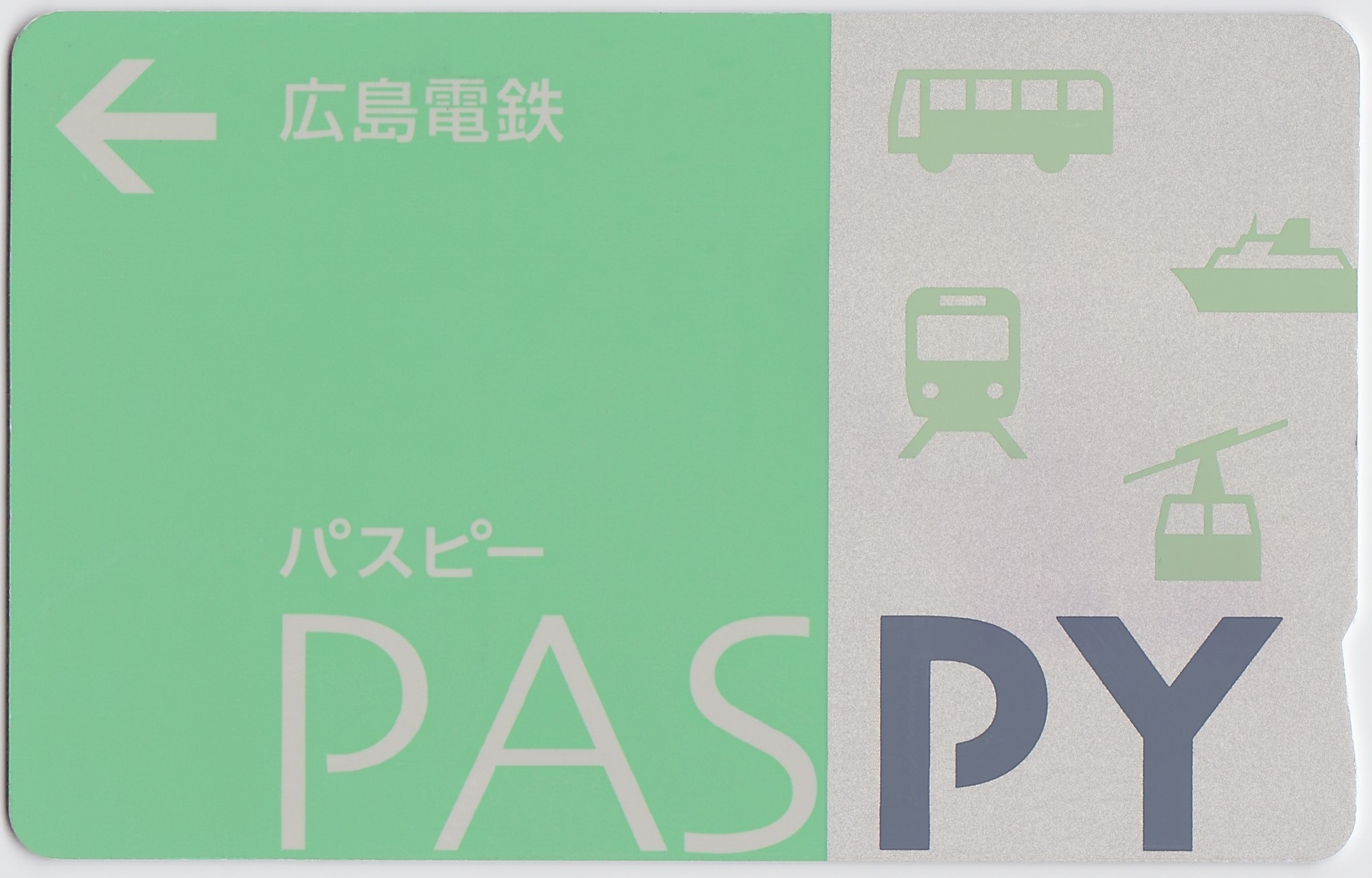 広島電鉄発行のPASPY